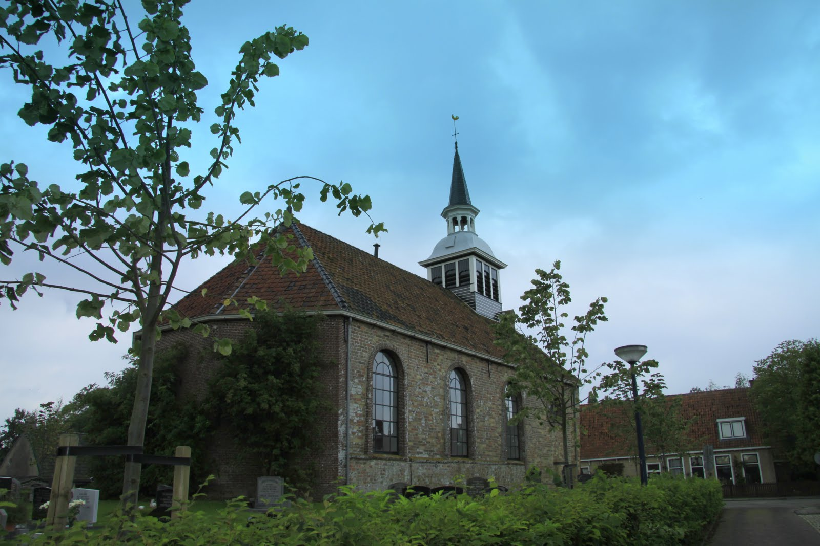 Peins Sint-Gertrudiskerk